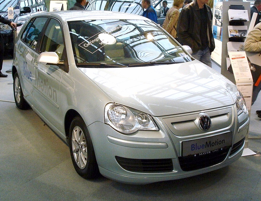 VW Polo Blue Motion